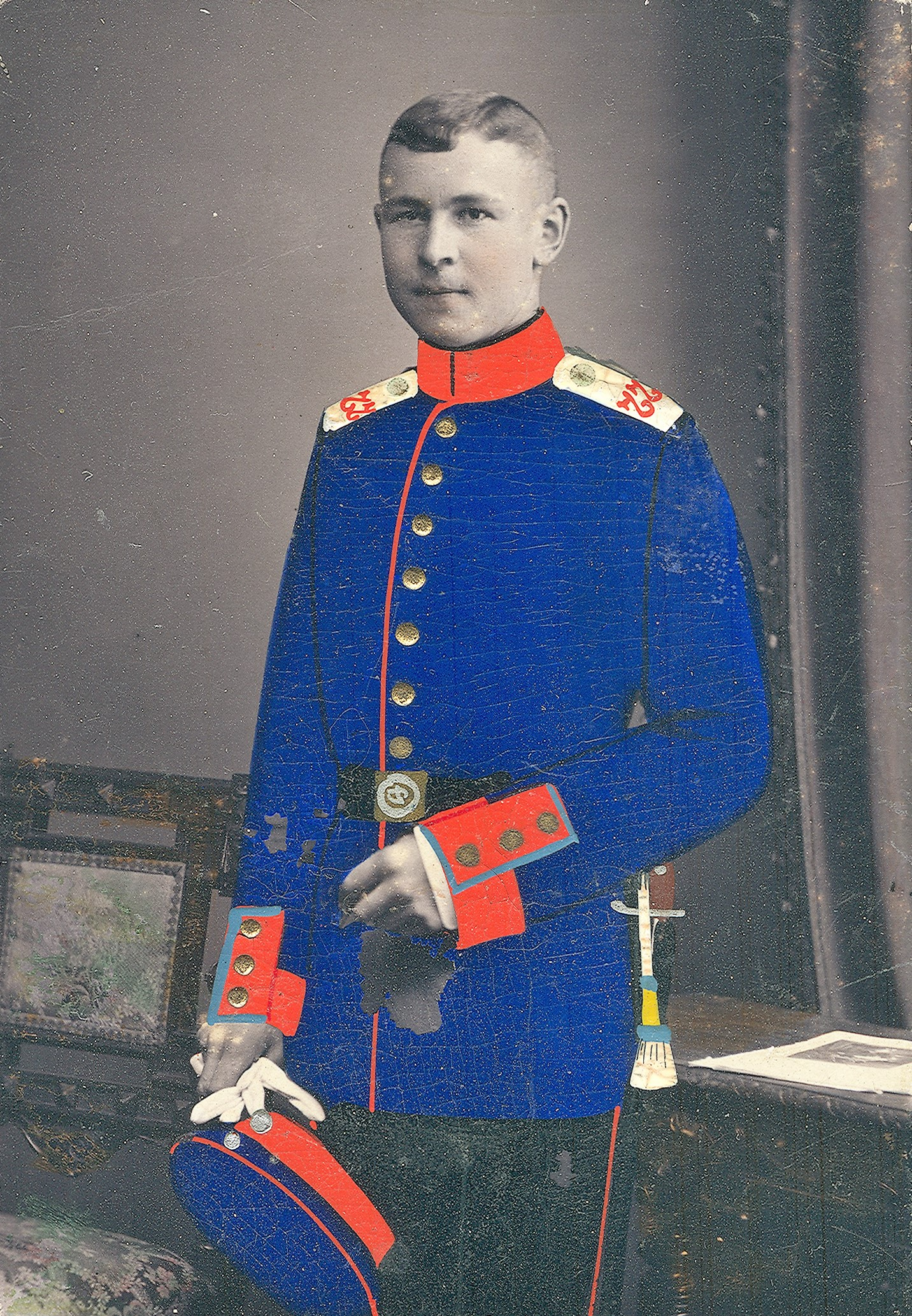 Musketier Oyer aus Westenholz (Ortsteil von Delbrück), Soldat vom Hannoverschen Infanterieregiment Nr.77 in Celle. Eine um die Jahrhundertwende 1899/1900 sehr populäre Form der Porträtaufnahme, die für einen Aufpreis auch koloriert wurde und als Andenken an Freunde und scheidende Kameraden diente. Die Atelieraufnahme des - beinahe kindlich wirkenden Soldaten wurde zunächst einer sehr zarten, wie ein pastellartiger Hauch angedeuteten Kolorierung unterzogen, die sich beispielsweise am Mobiliar und auf der Wange des Knaben zeigt. Im Anschluss wurde Mütze und Rock mit dicken blauen und roten Farbpasten übermalt. Auffallend ist die sorgfältige Kolorierung der Regimentsmerkmale: weiße Schulterklappen mit roter Regimentsnummer "77", rote Ärmelpatten mit hellblauer Paspelierung und der Seitengewehrtroddel, die ihn mit blauem Kranz und Schieber sowie gelbem Stengel als Angehörigen der 12.Kompanie ausweisen. ...